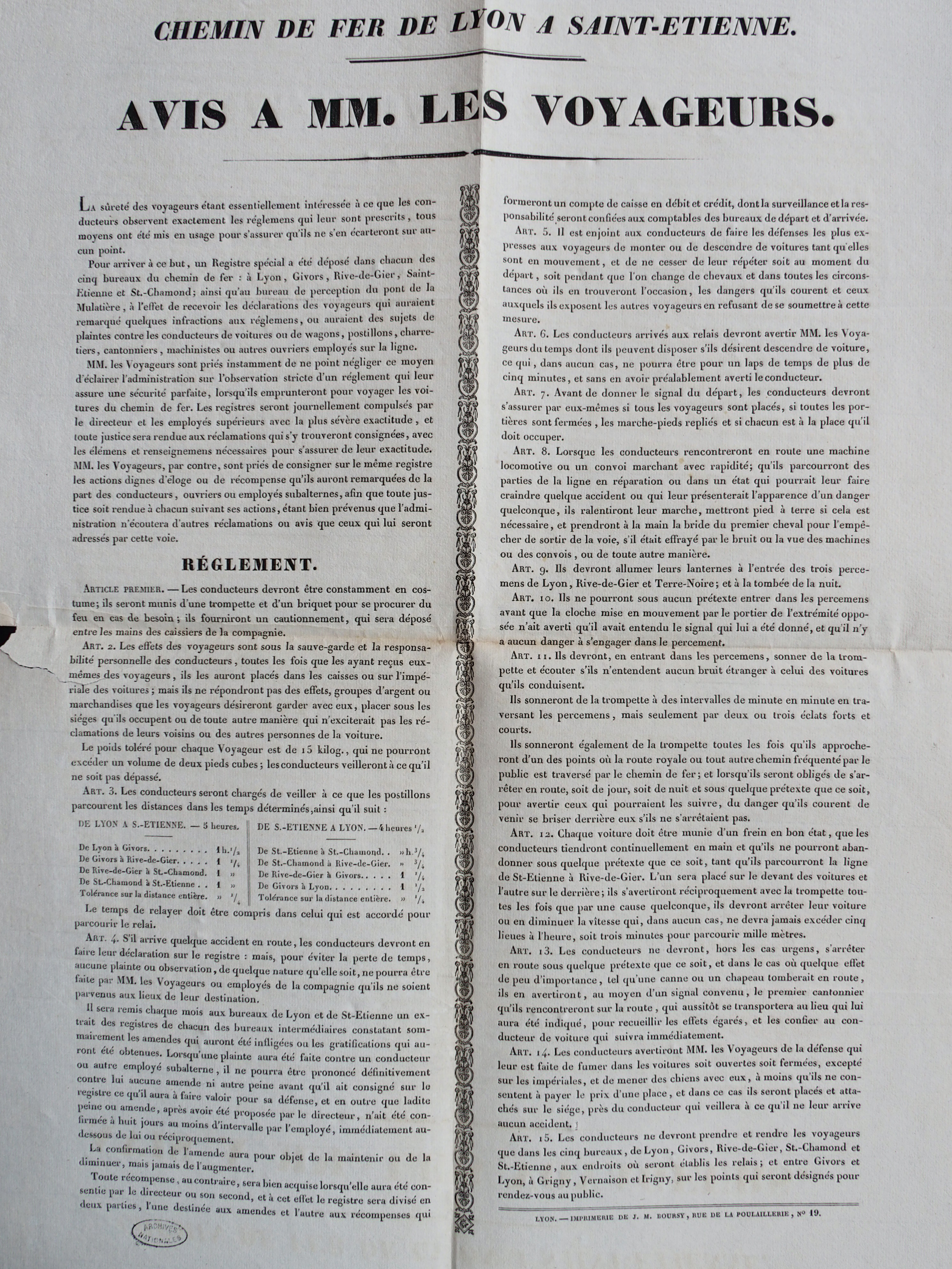 Chemin de fer de St Étienne à Lyon - Affiche d'information des voyageurs XIXe siècle (circa 1840)